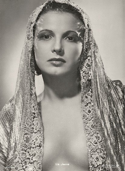 La Jana